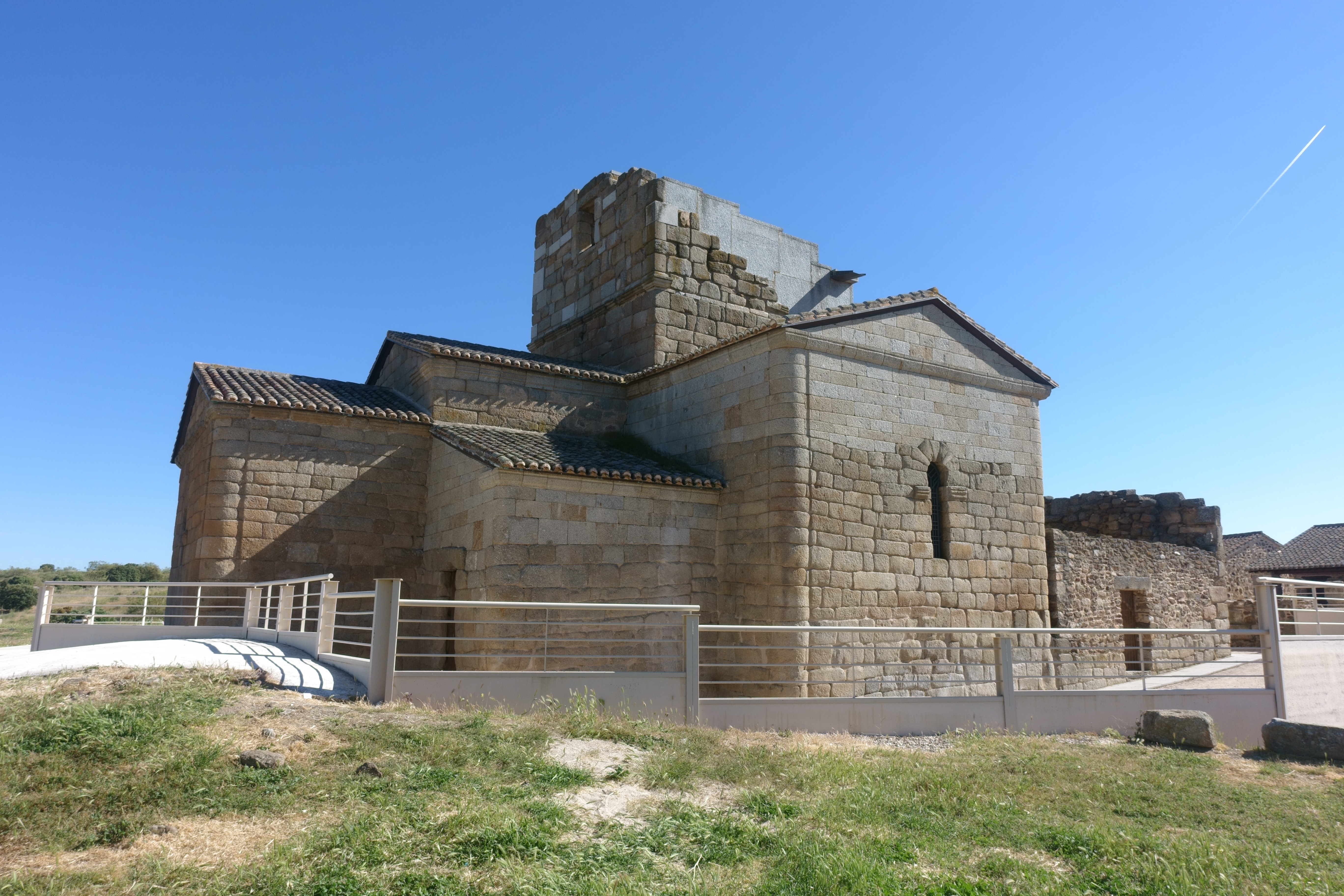 Exterior de la iglesia de Santa María de Melque, en San Martín de Montalbán (Toledo, España).